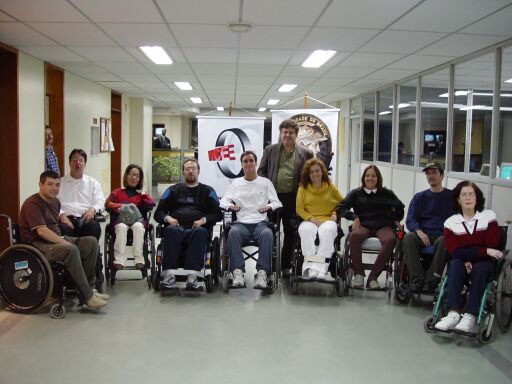 foto do grupo Motrix